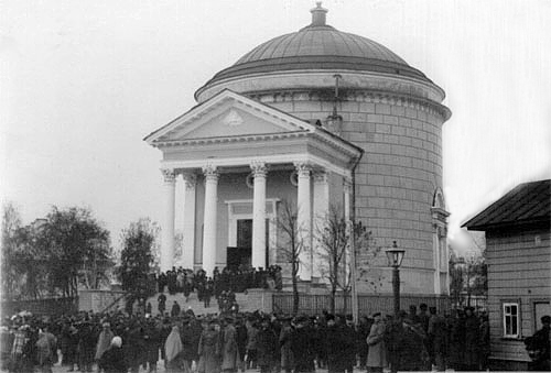 Католический храм в Кронштадте, фото 1898 года